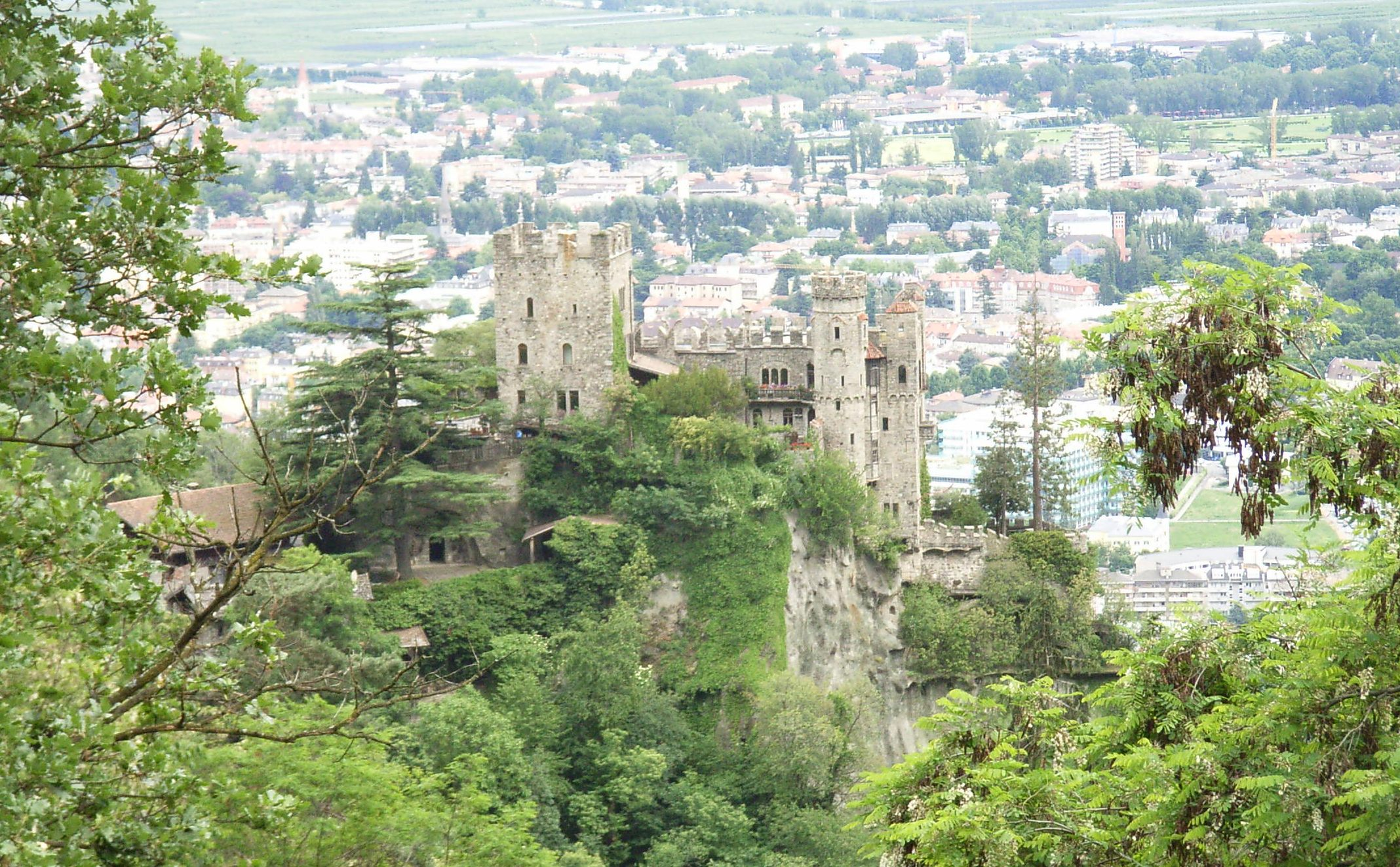 Brunnenburg in Dorf Tirol, Italy